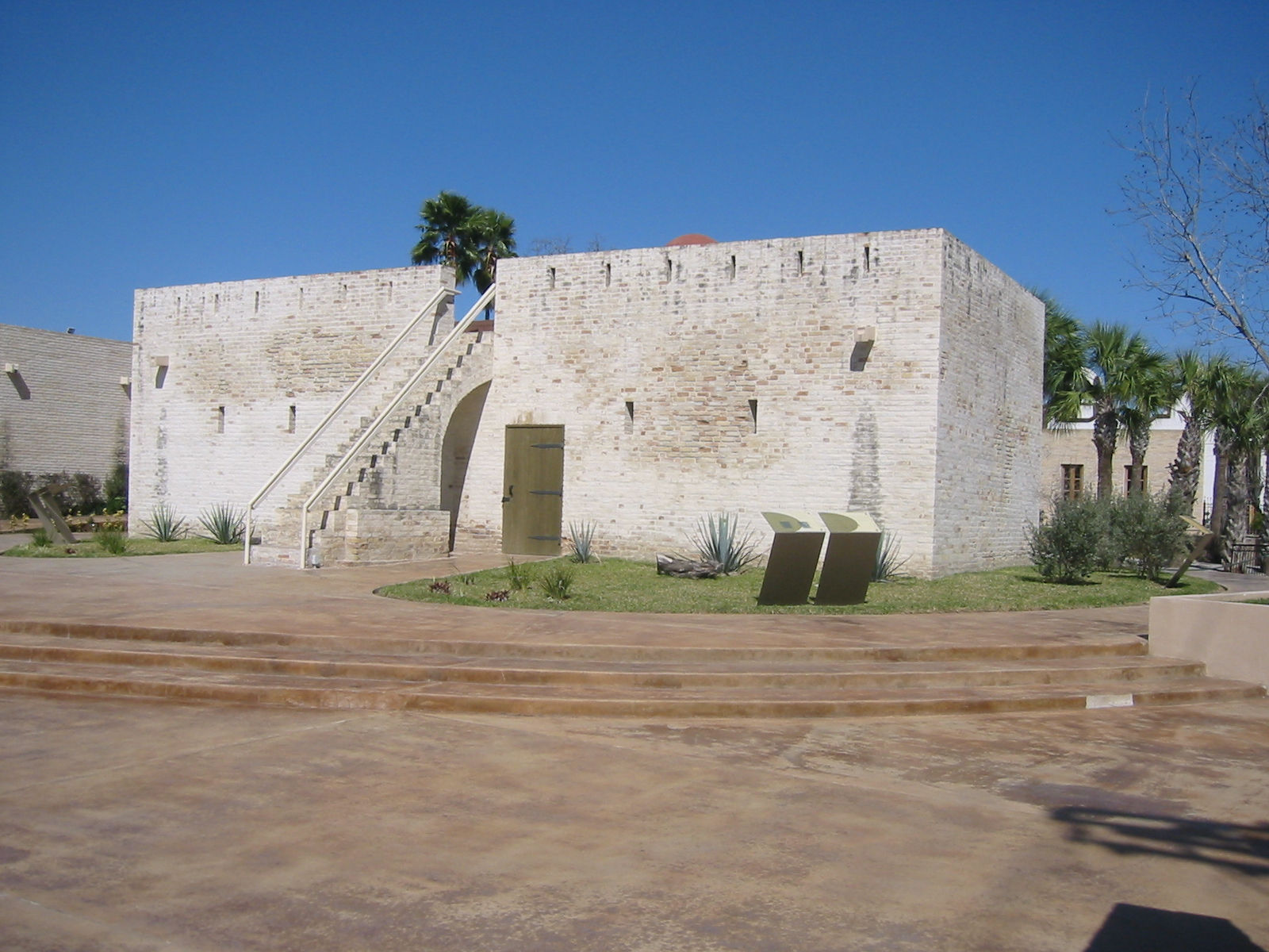 Museo Fuerte Historico Casamata